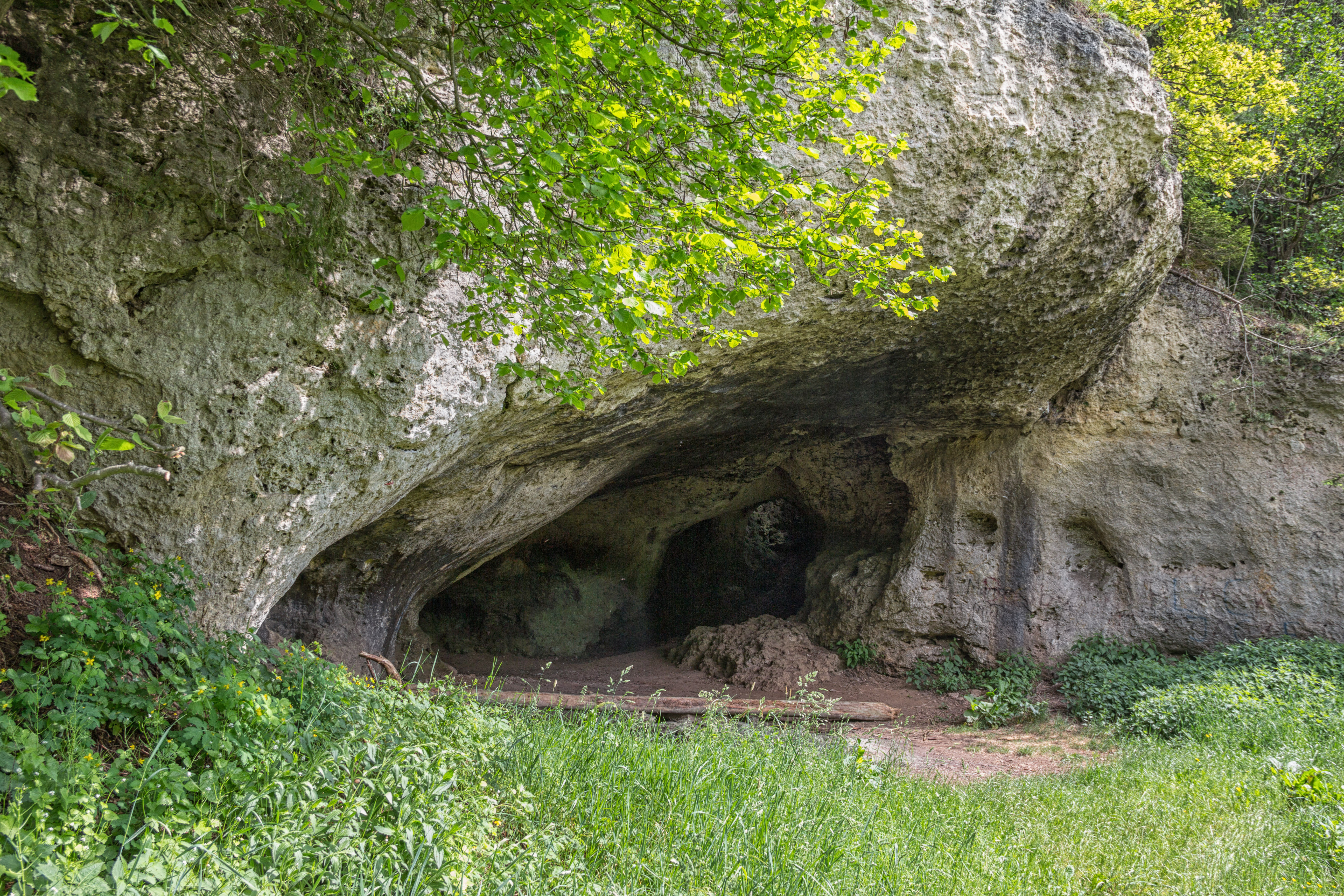 Felslindl, Eingang, Karsthöhle, Geotop, Naturdenkmal, Naturpark Fränkische Schweiz-Veldensteiner Forst, Auerbach i.d.OPf.